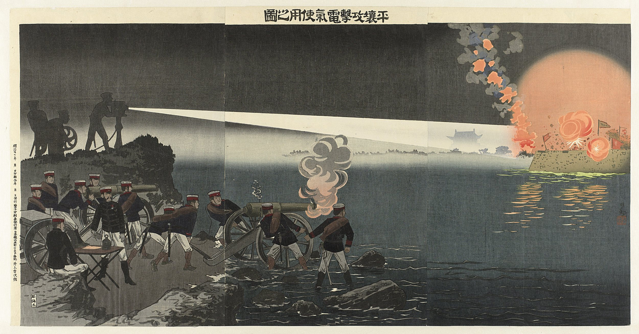 Bij de nachtelijke aanval op Pyongyang (Korea) tijdens de Eerste Chinees-Japanse Oorlog (1894-1895), gebruikt het Japanse leger een zoeklicht om het doelwit te vinden. Label Line: mentioned on object Kobayashi Kiyochika (1847 - 1915), 1894, kleurenhoutsnede; lijnblok in zwart met kleurblokken Collection: prenten; Japan (collectie)